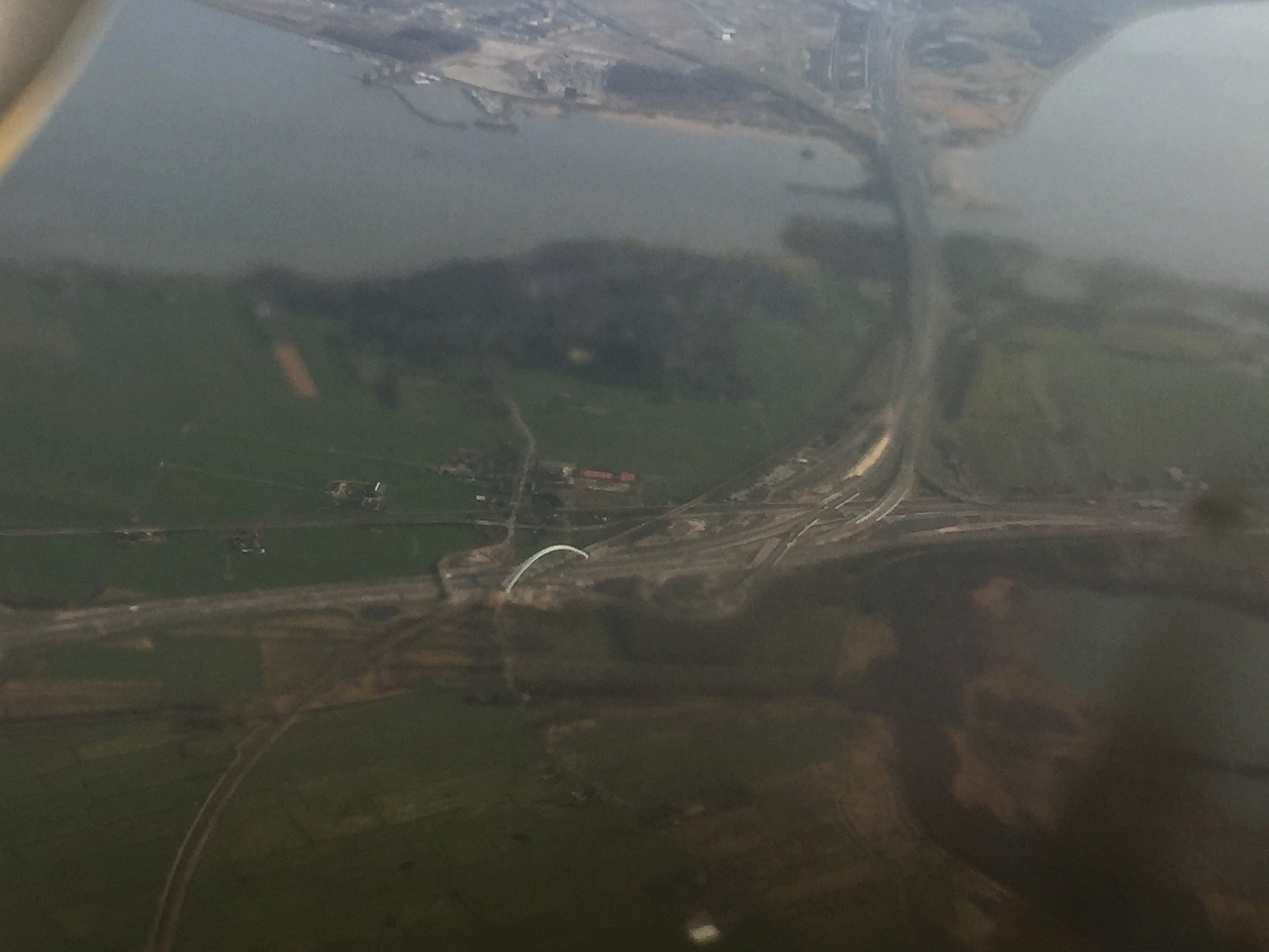 Luchtfoto van knooppunt Muderberg, gezien naar het noorden